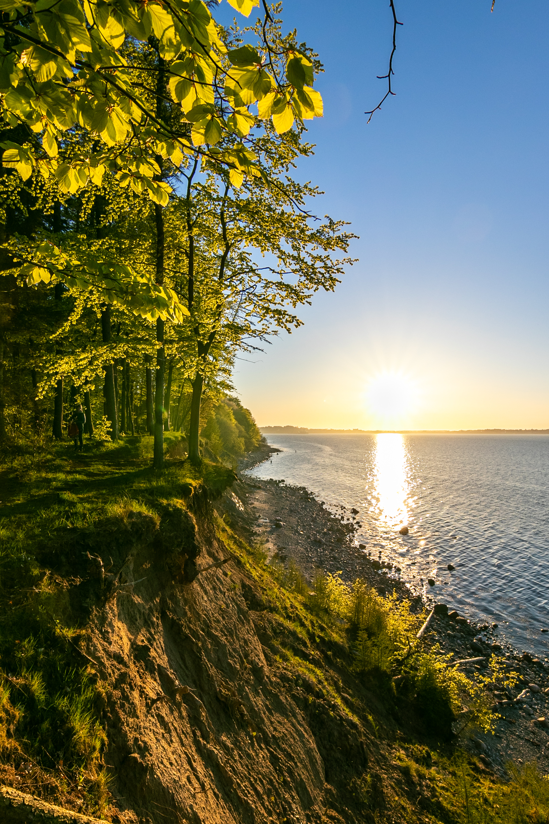 Landschaftsschutzgebiet Küstenlandschaft Dänischer Wohld: Steilküste bei Eckernförde.